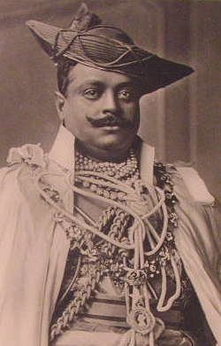 Madho Rao Scindia